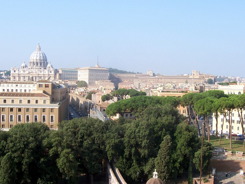 Roma - Vaticano visto Castel Sant'Angelo